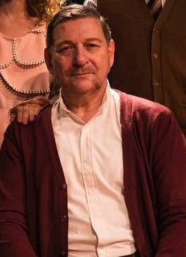 El elenco del "Relojero" integrado por Osmar Núñez, Horacio Roca, Stella Galazzi, Federico Salles, Martín Urbaneja y Laura Grandinetti en el Teatro Regio en 2017.